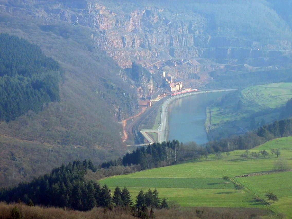 Aufnahme aus dem Saartal mit einen Regional-Express (BR 143 mit Doppelstockwagen) auf der Saarstrecke vor der Kulisse des großen Granit-Steinbruchs bei Taben-Rodt, fotografiert vom Gipfelkreuz auf der Bergspitze von Maunert (417m ü. M.)